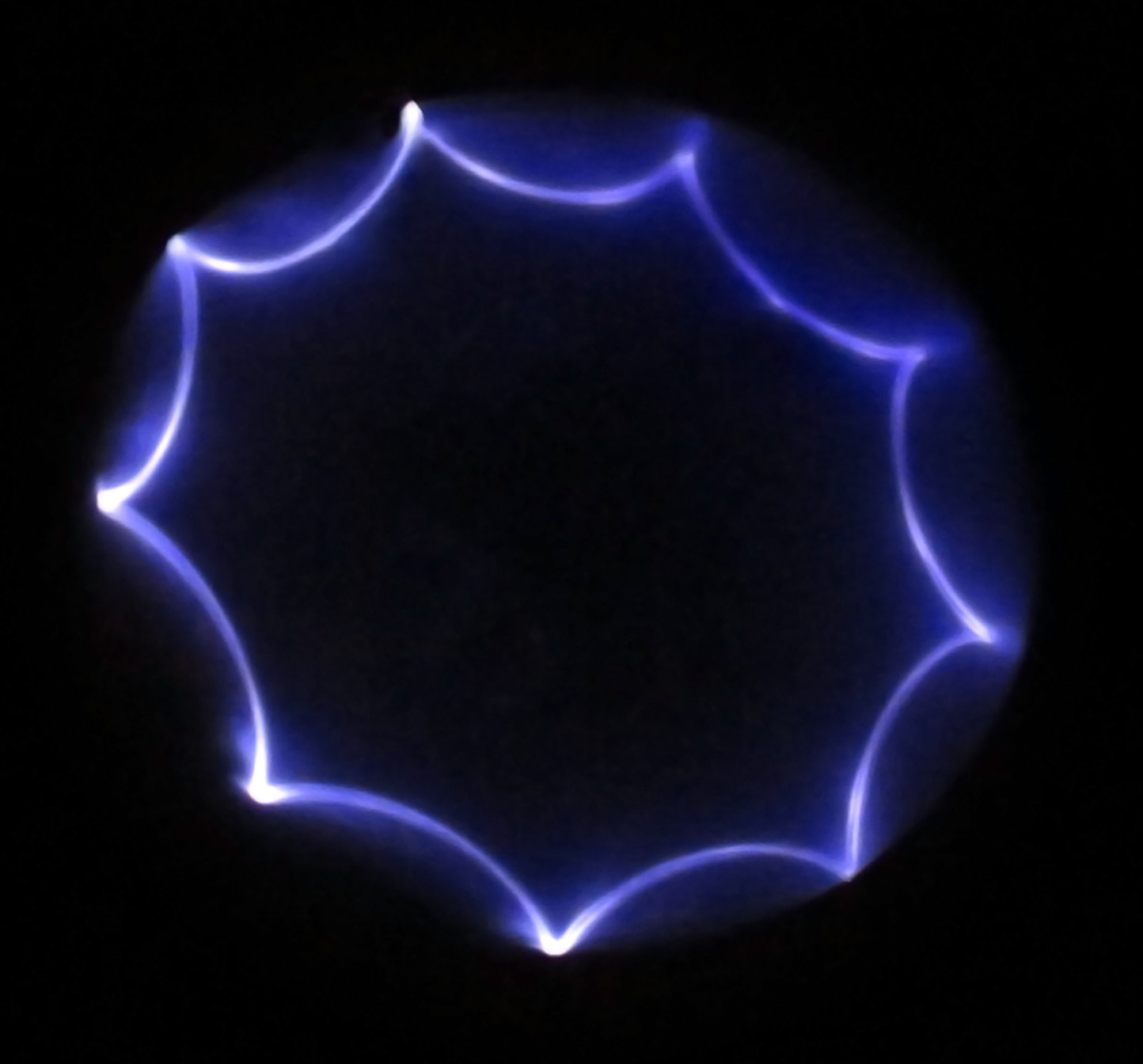 Тонкая цилиндрическая батарейка с прикрепленным к ободу светодиодом помещается внутрь воздушного шарика. При энергичном встряхивании шарика батарейка встает на ребро и начинает катиться внутри шарика по окружности, сам светодиод движется по гипоциклоиде.